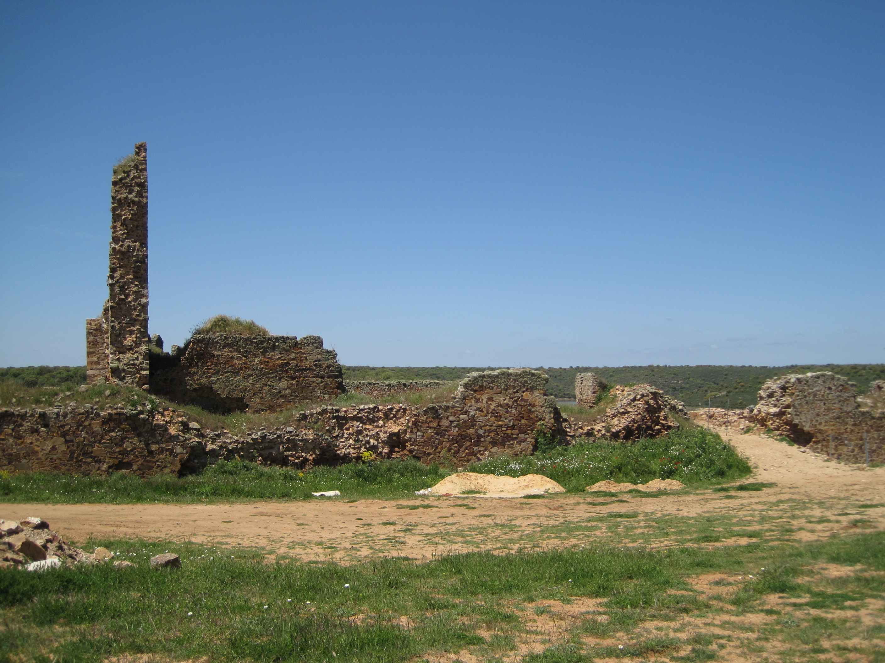 Vista parcial del lienzo este del castillo de Castrotorafe (Zamora, España).